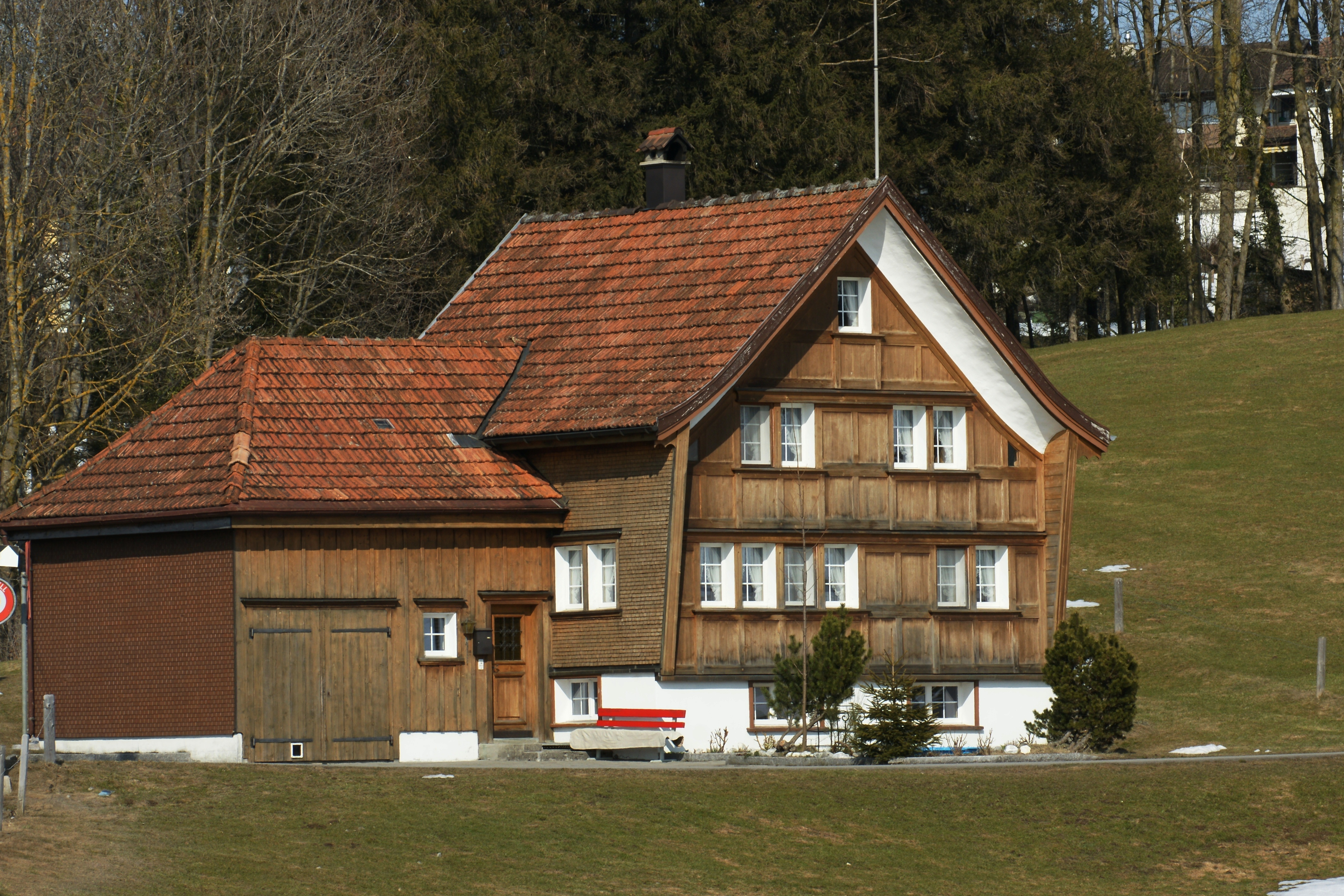 Appenzeller Haus gelegen an der Gaiserstrasse zwischen Gais und Appenzell.